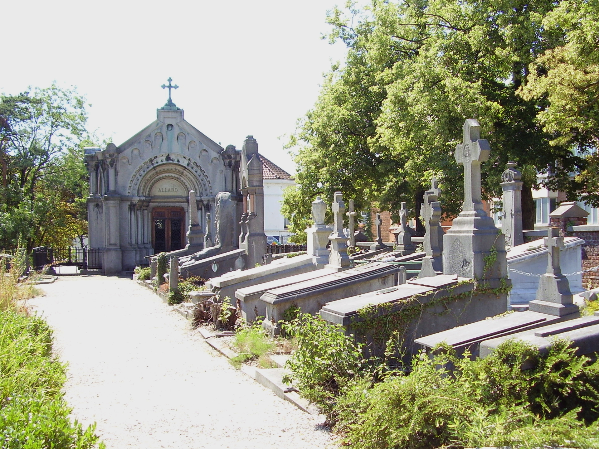 Description: Cimetière du Dieweg (Bruxelles) - à l'arrière plan, le monument funéraire de la famille Allard (1878) Author: User:Ben2 Date of creation: 30 juillet 2006 Source: Photo personnelle